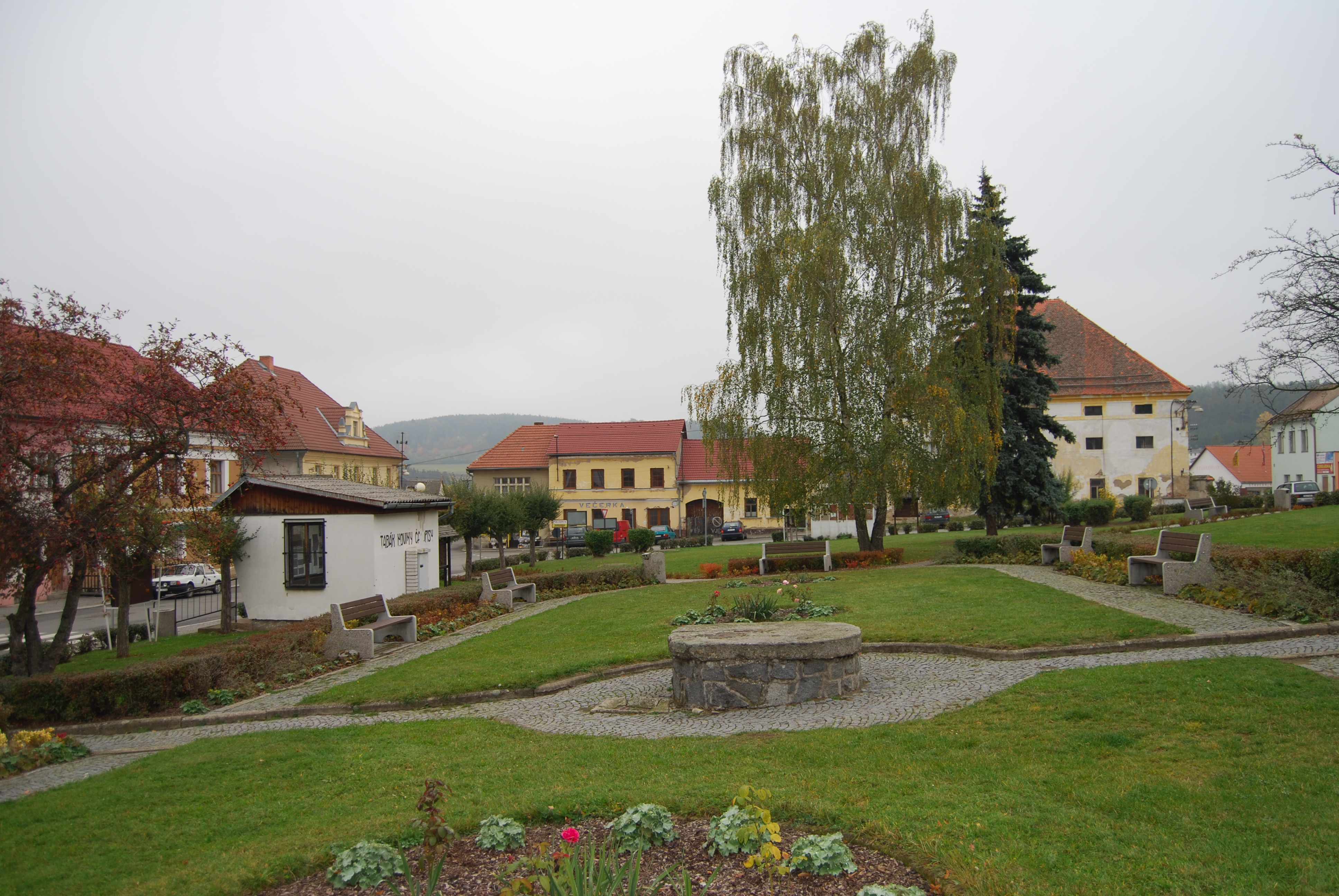 Pohled na park na náměstí. Krásná Hora nad Vltavou. Okres Příbram. Česká republika.